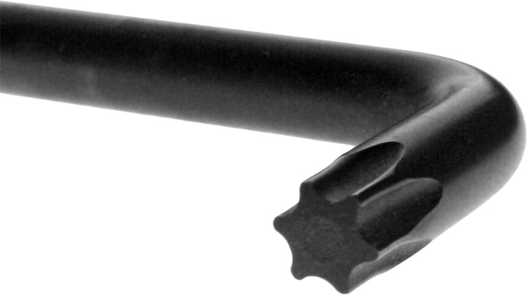 Torx-Schraubenschlüssel.